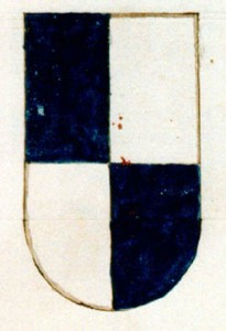 Blason des Manfredi des Reggio Emilia